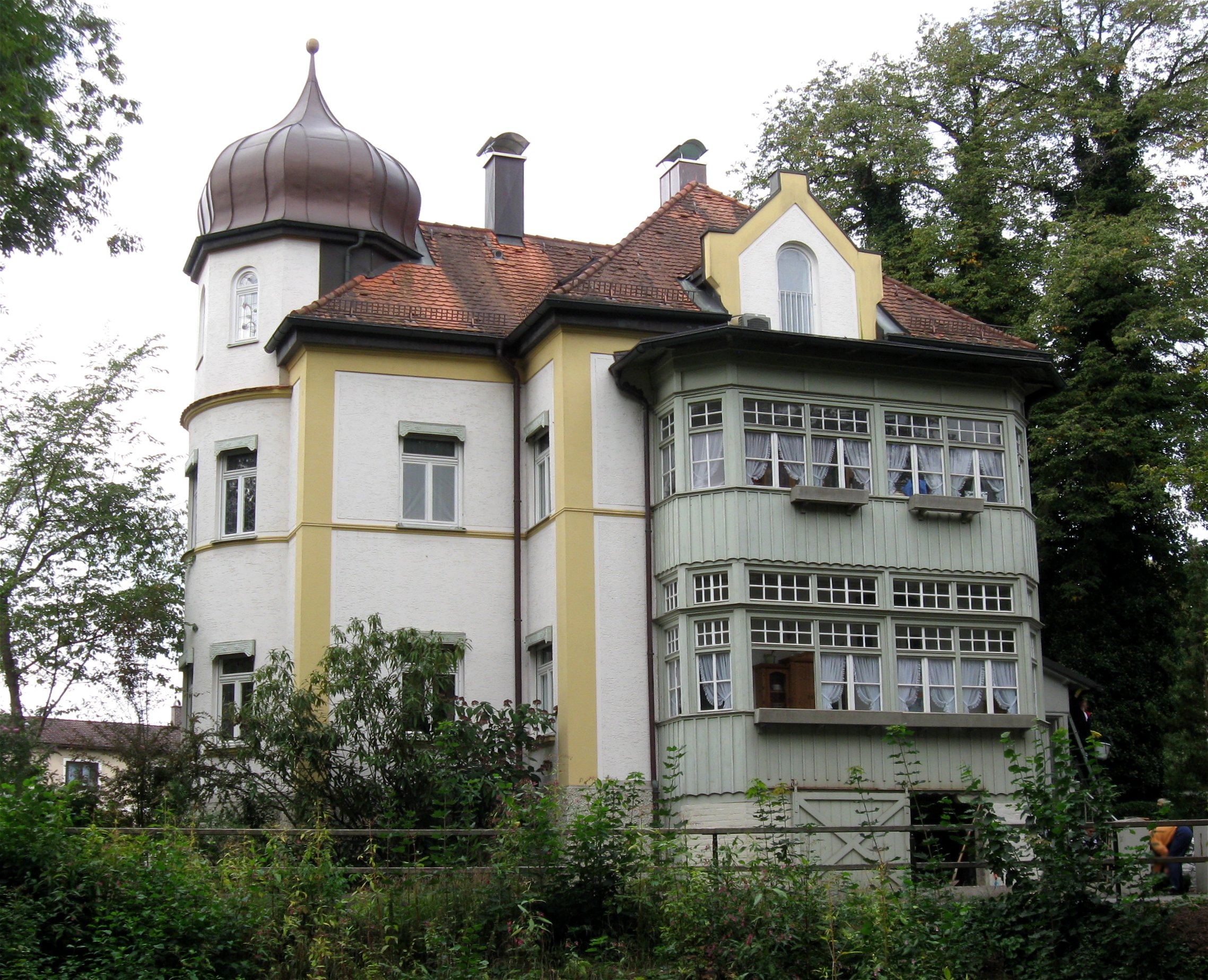 Meggendorfer Straße 11. Kurpension und Ärztehaus, zweigeschossiger Putzbau in Ecklage mit Zwerchhaus, Erkerturm mit Zwiebelhelm, hölzernen Veranden, farbigen Jugendstilfenstern und Walmdach im Neubarockstil, um 1900.